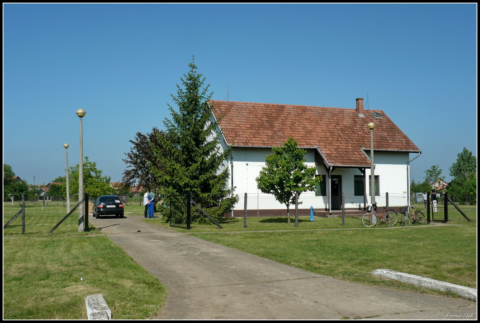 Bakonszeg, 4164 Hungary